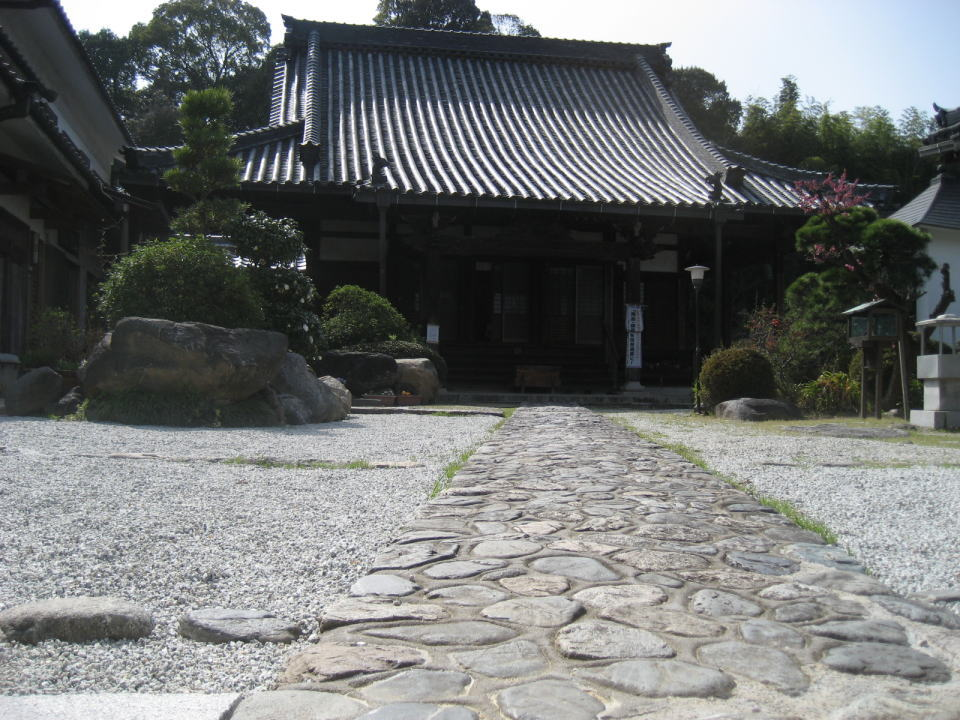 向原寺の本堂（橿原市）